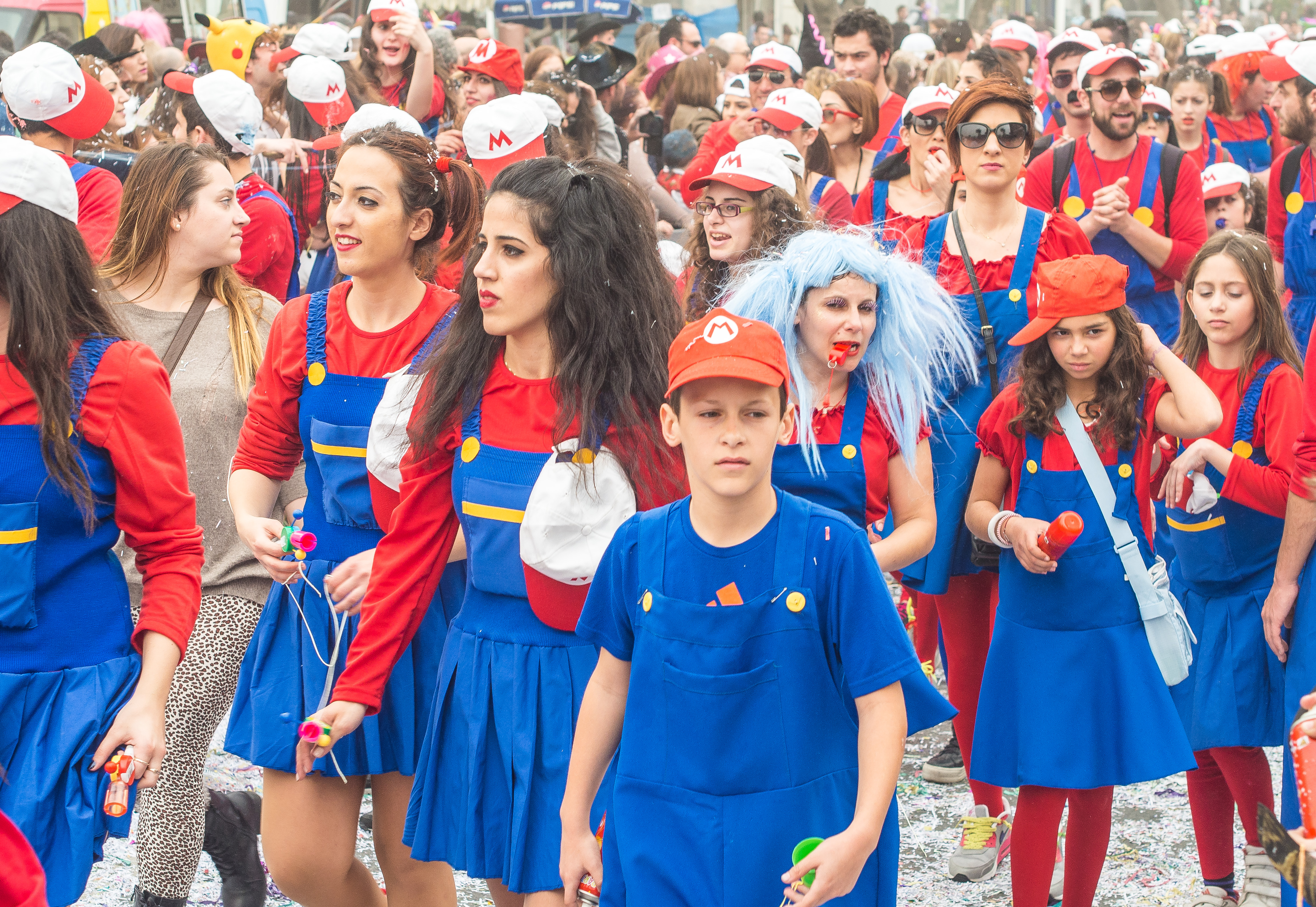 Carnival in Limassol 2014